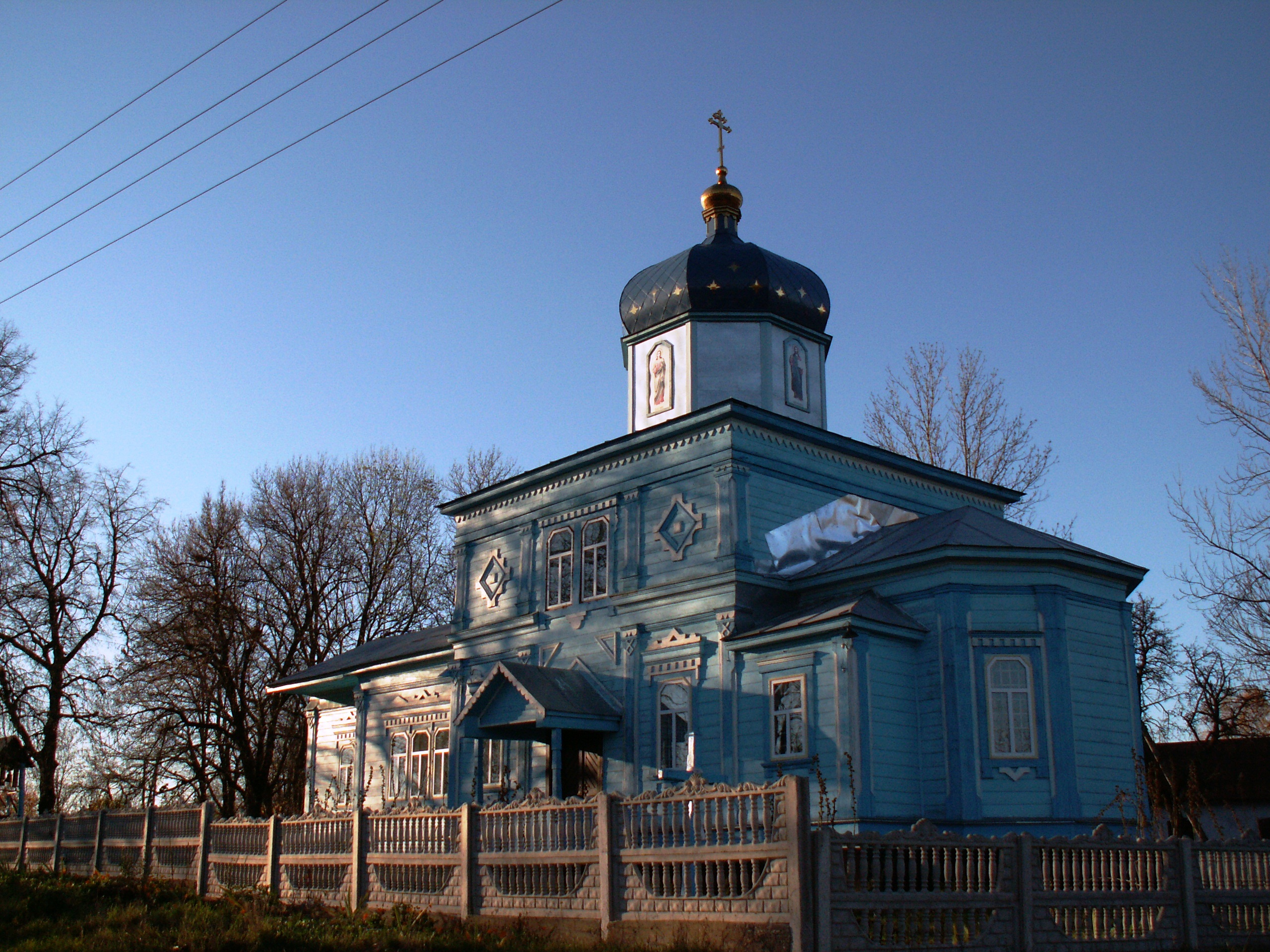 Покровська церква в с. Дзвониха